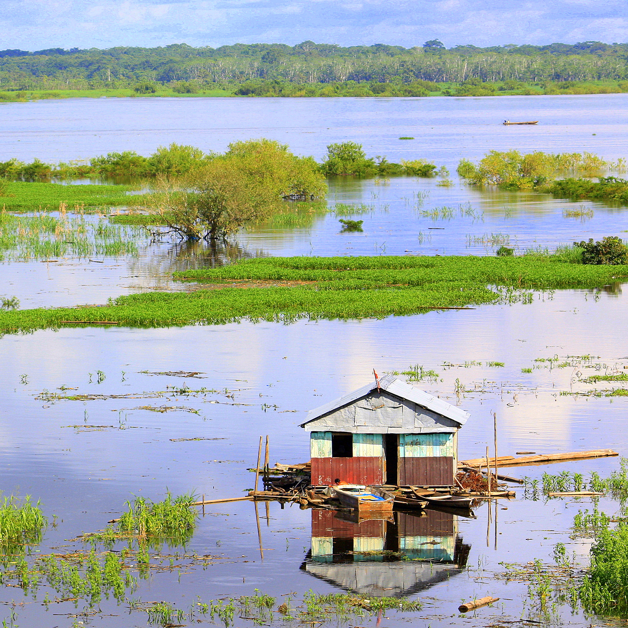 Paisaje amazónico que rodea a Iquitos